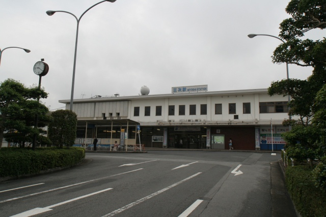 三次駅正面。投稿者が撮影(2007/08/30)